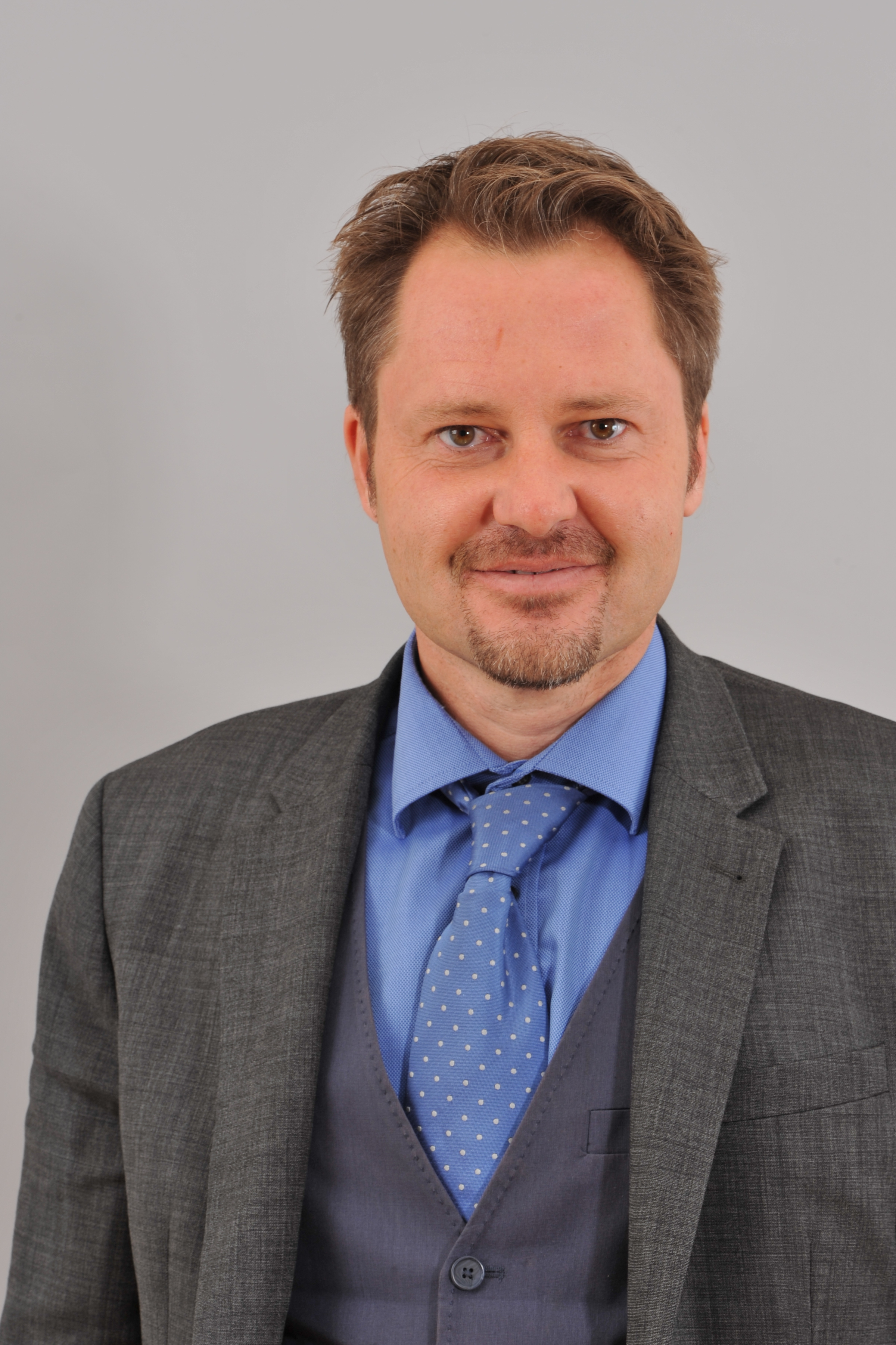 Landtagsprojekt Salzburg: Karl Schmidlechner